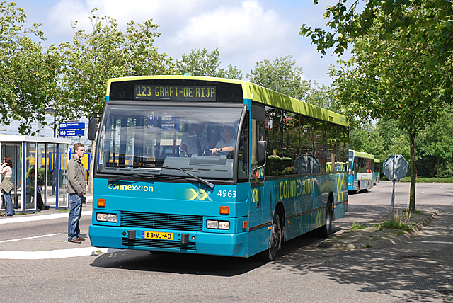 B88 4963 van Connexxion op lijn 123 te Alkmaar Station.